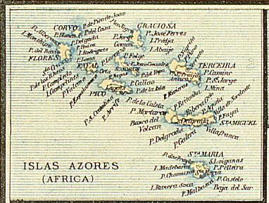 Islas Azores.Detail from a map Nuevo mapa de España y Portugal y de sus colonias, ilustrado con los 49 escudos de sus Provincias y con las 14 Decoraciones Militares, indicando todos los caminos de hierro, carreteras, ríos y canales, Escala 1/165000